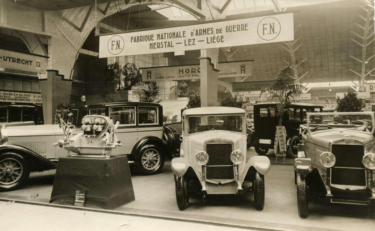 Stand de la FN Herstal, 1929. A l’instar de l’agglomération stéphanoise en France, Liège est depuis plusieurs siècles un pôle armurier de 1er ordre. Plusieurs artisans s’associent en 1889 pour fonder à Herstal, au nord-est de la ville, la future Fabrique Nationale. Son destin est très tôt lié à celui du fabricant américain d’armes de poing Browning et, plus tard, son concurrent Winchester spécialisé dans les carabines. La diversification est amorcée presque immédiatement avec les vélos (leur production cesse fin des années 20) puis, entre 1899-1901, voitures (arrêtées en 35) et motos. Panel complété par les camions après 1930. L’ensemble des productions non liées à l’armement sont liquidées vers 1967 et, 30 ans plus tard, la région wallonne devient actionnaire du groupe à 100%. FN Herstal employait plus de 10 000 salariés en milieu de décennie 1970, actuellement moins du tiers. Pour rester sur le sol européen l’allemand Simson, le britannique BSA (Birmingham Small Arms Co.), le français Hotchkiss, l’autrichien Steyr, le suédois Husqvarna, le tchèque Škoda, le serbe Zastava ou encore le russe Izhmash (Kalashnikov), sont quelques exemples d’autres entreprises ayant toutes débutées par l’armement avant de se lancer, parfois avec un réel succès, dans le matériel de transport.